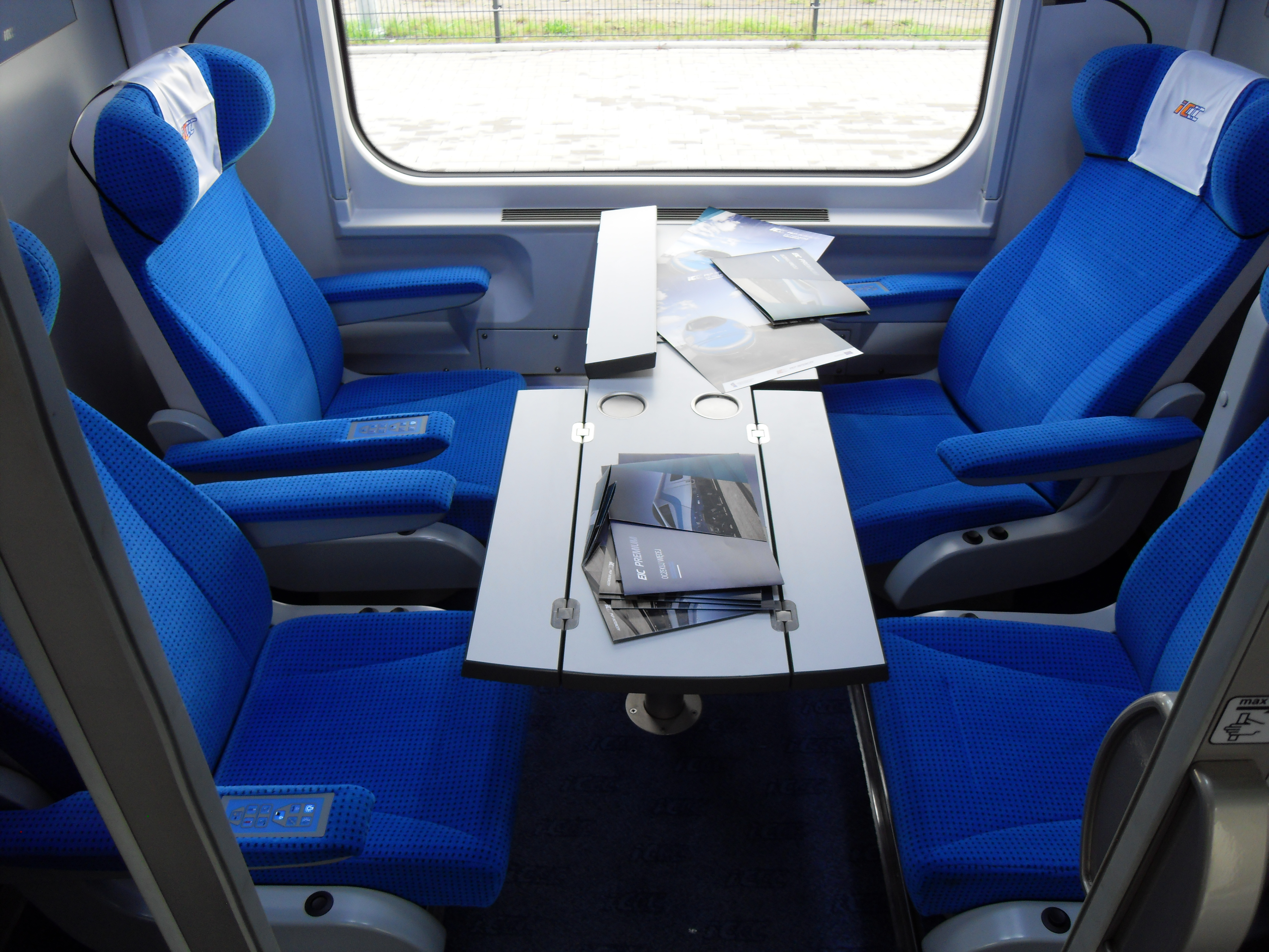 Gdańsk Letnica. TRAKO 2013, wagon 156A (H. Cegielski), przedział 4-osobowy.